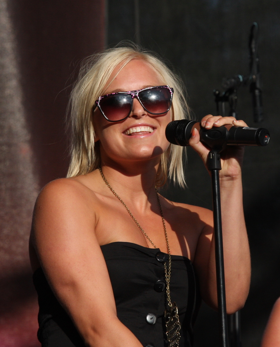 Eva Weel Skram